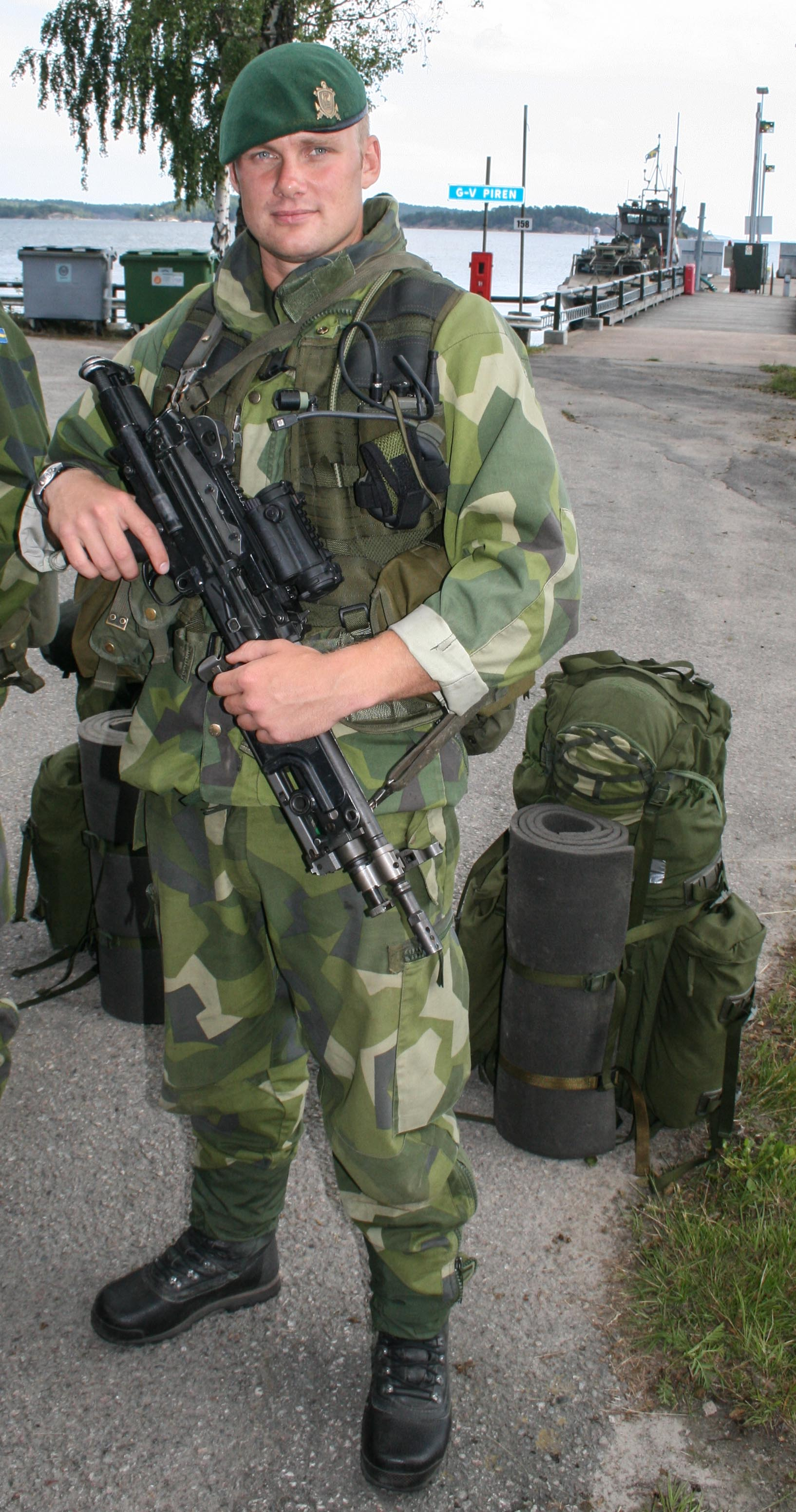 Soldier at Berga navy baselabel QS:Len,"Soldier at Berga navy base"label QS:Lhu,"Tengerészgyalogos a Berga haditengerészeti támaszponton"